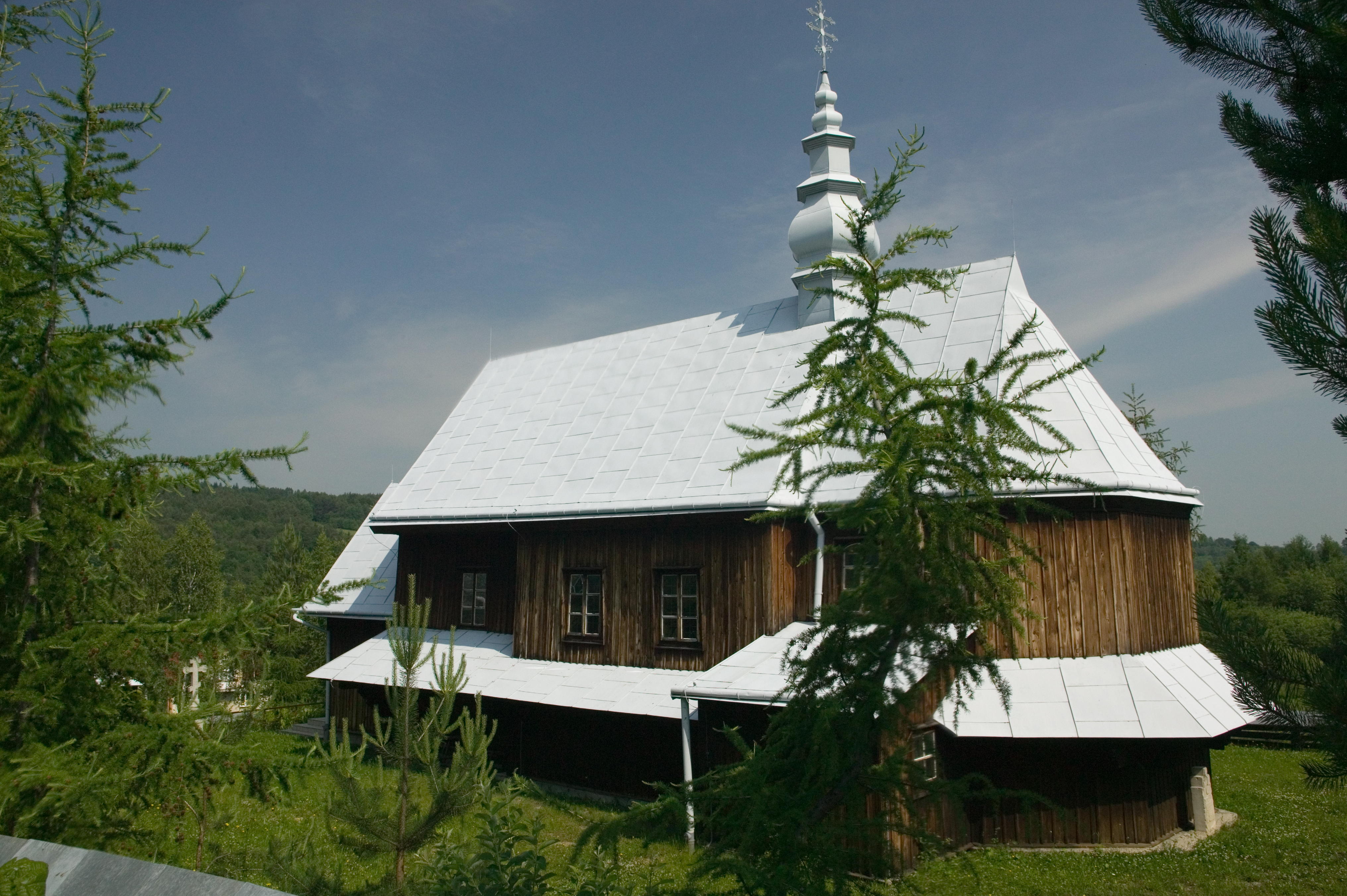 Rozdziele, cerkiew, pod wezwaniem Opieki Matki Bożej (Pokrow). W Rozdzielu od 1984 roku, została przeniesiona z Serednicy (Pogórze Przemyskie.